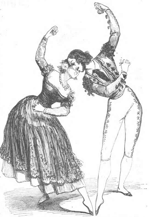 Herr Campruri und Madame Dolores im Costüm spanischer Tänzer.